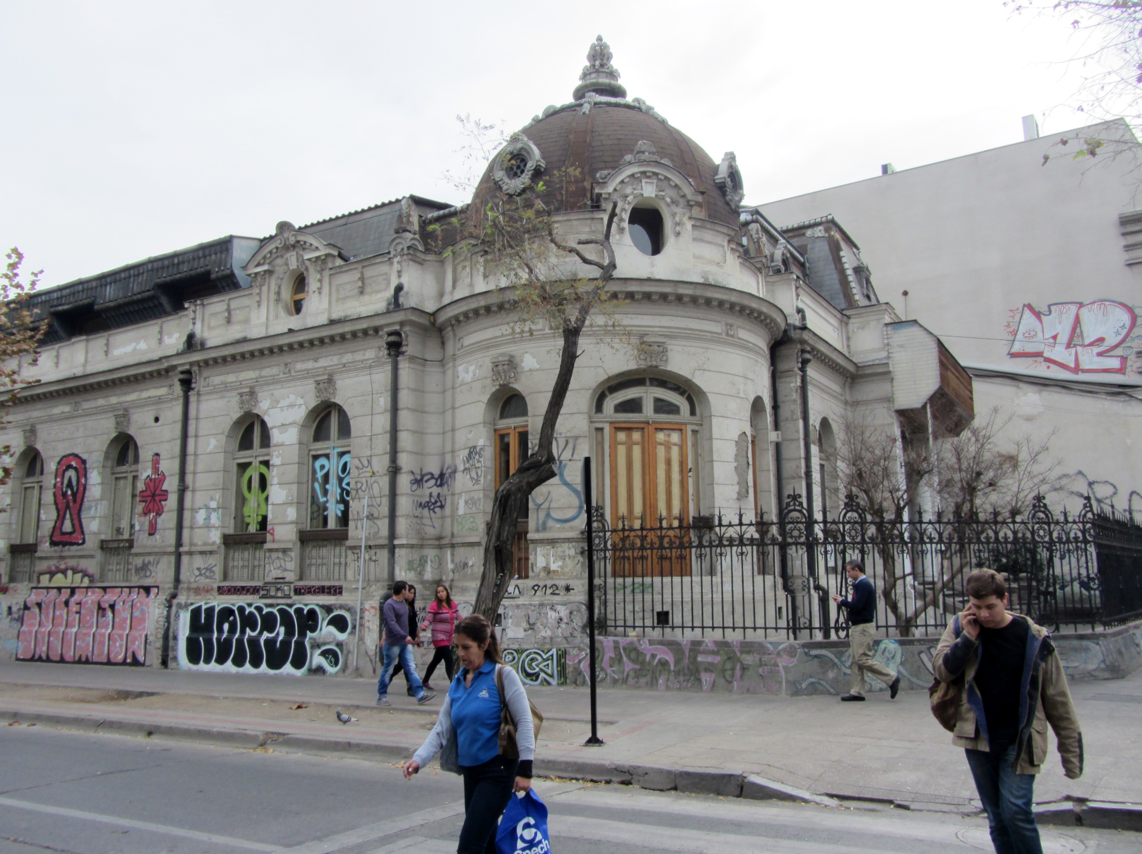 avenida República